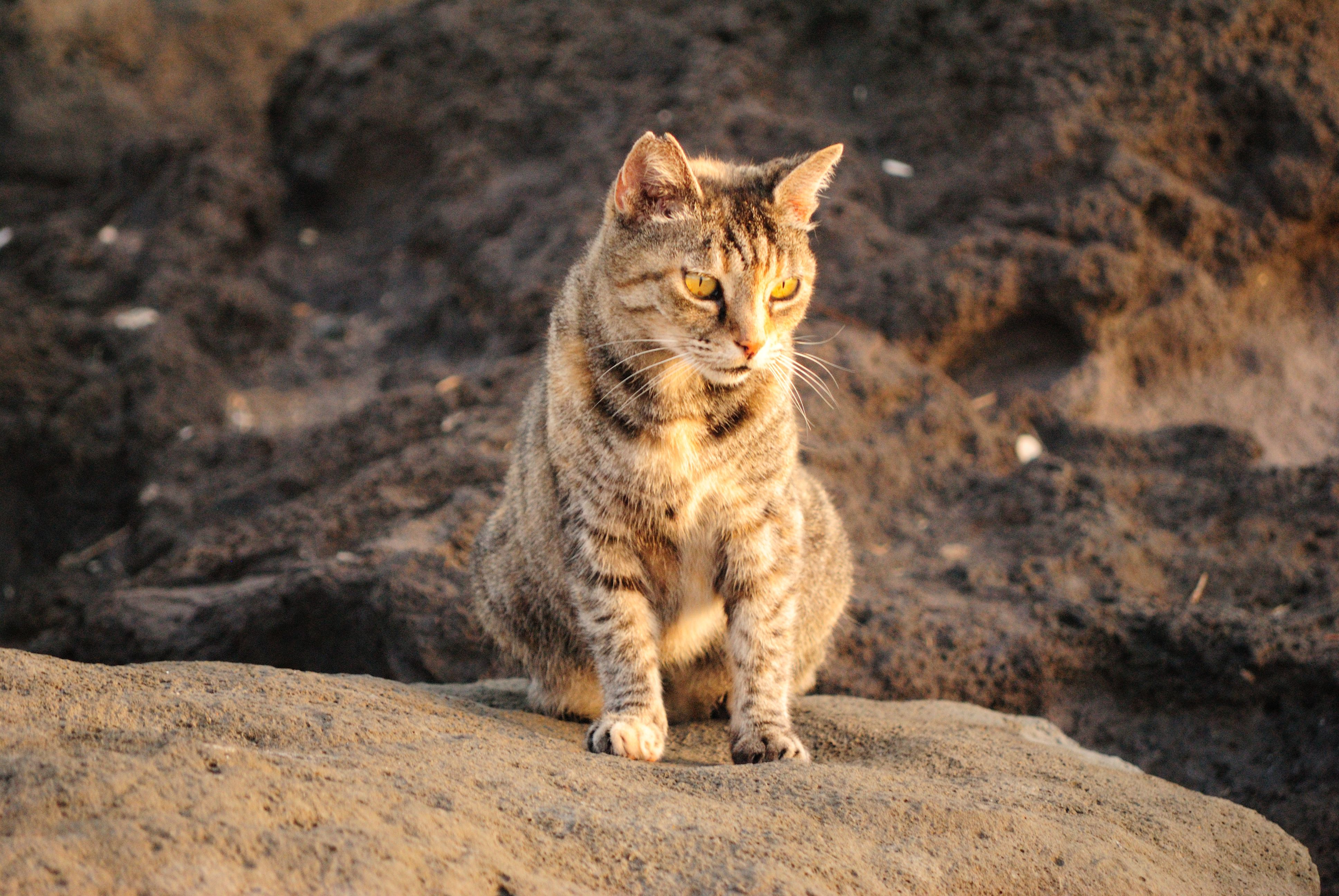 Stray Cat @ Kakaako Park